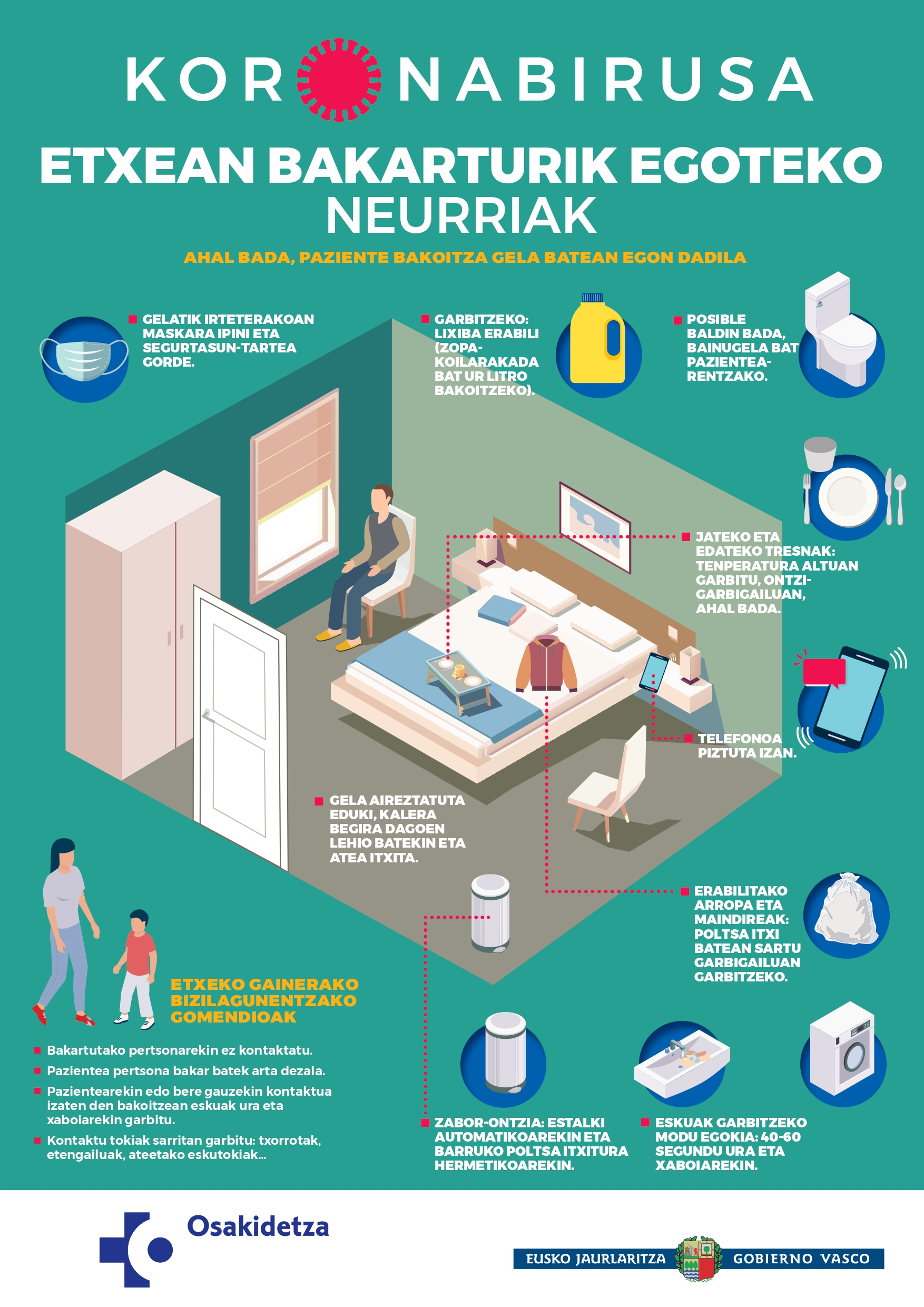 Koronabirusa - etxean bakarturik egoteko neurriak